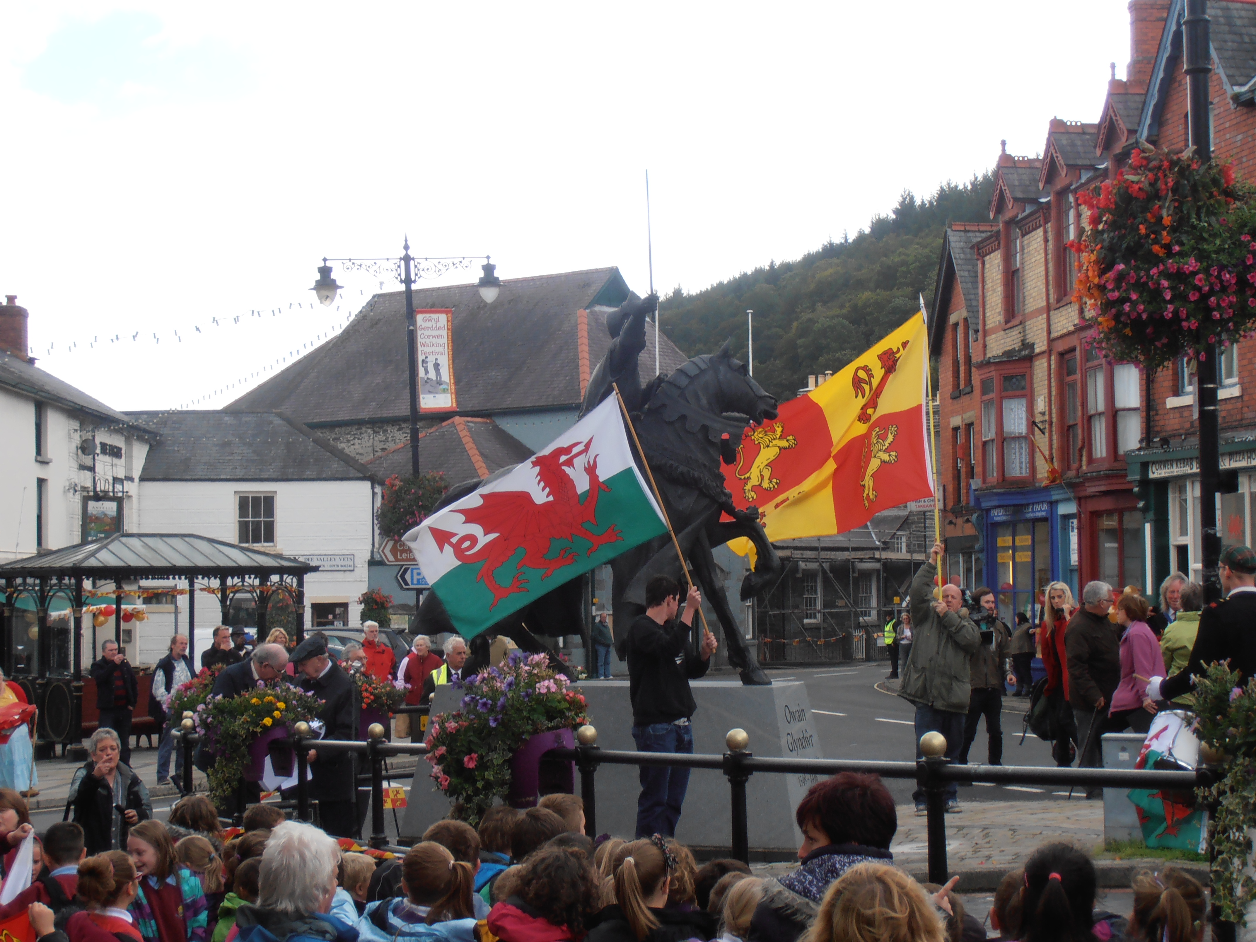 Dathliadau Owain Glyn Dwr yng Nghorwen; Medi 16 2013. Sir Ddinbych. Band Cambria: drymwyr a ffliwt.